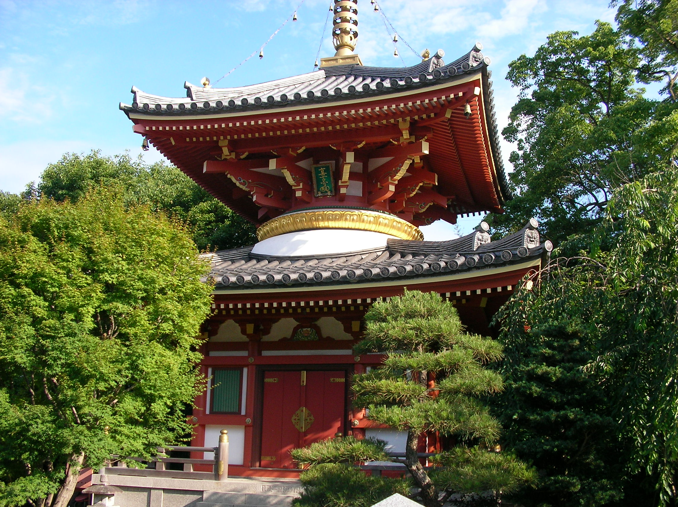 onsenzan-anrakuji-tahouto